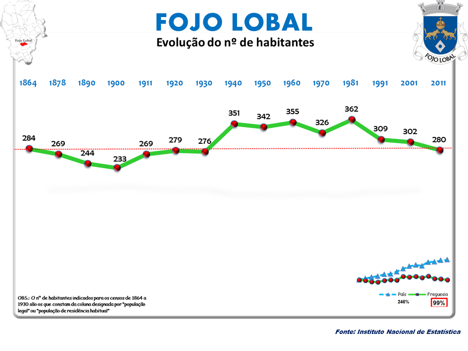 Cenos 1864/2011